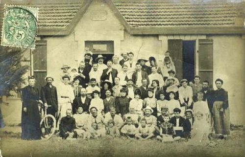 En 1905, à Chatelaillon (Charente-Maritime), ouverture d'une colonie de vacances libertaires, sous le nom de Libertaire-Plage.